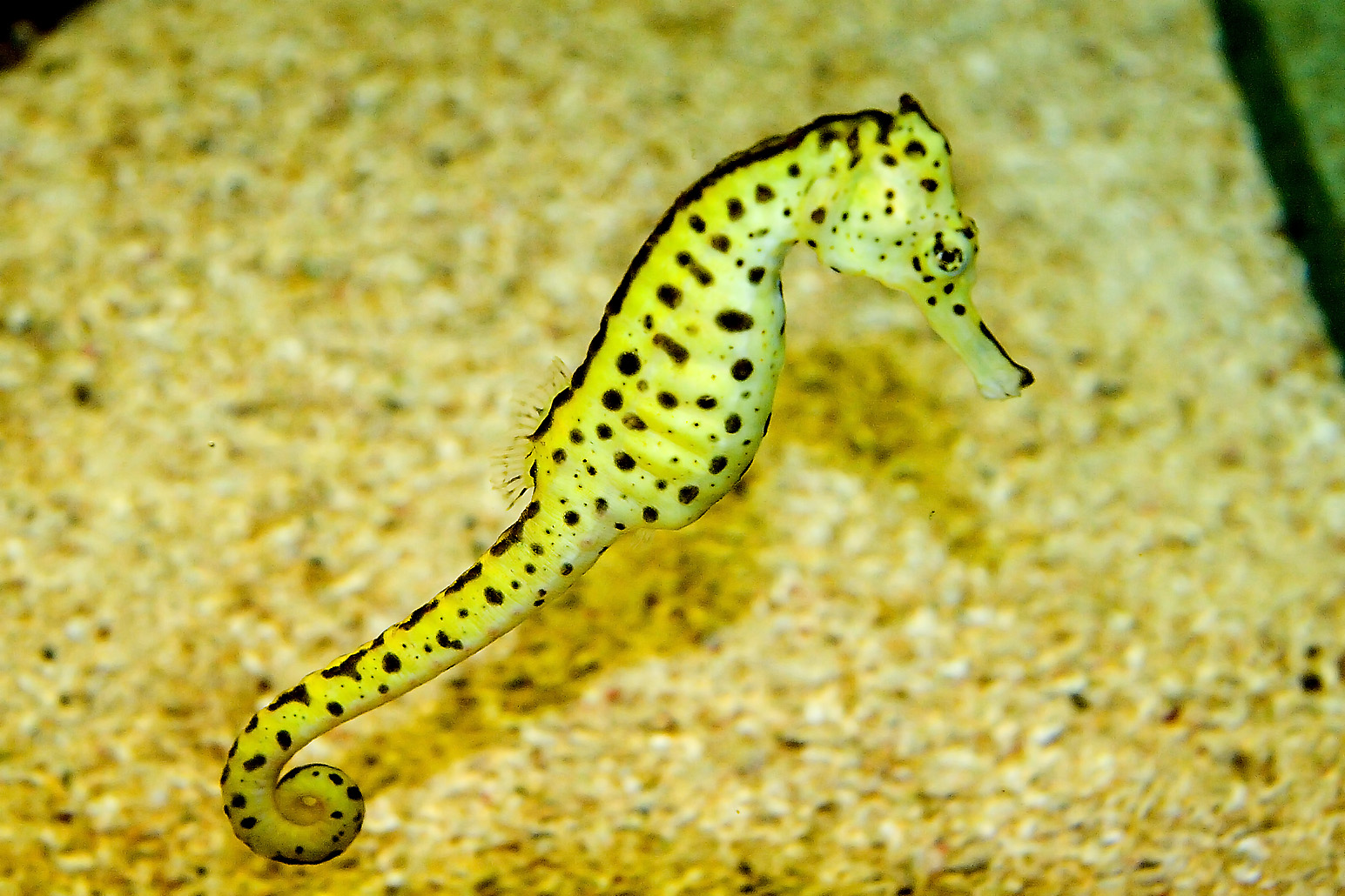 Seepferdchen, aufgenommen im Zoo Frankfurt